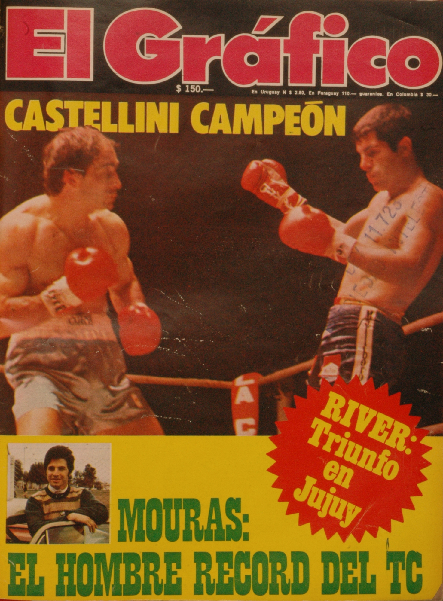 El Grafico del 12 de Octubre de 1976. Edicion 2975